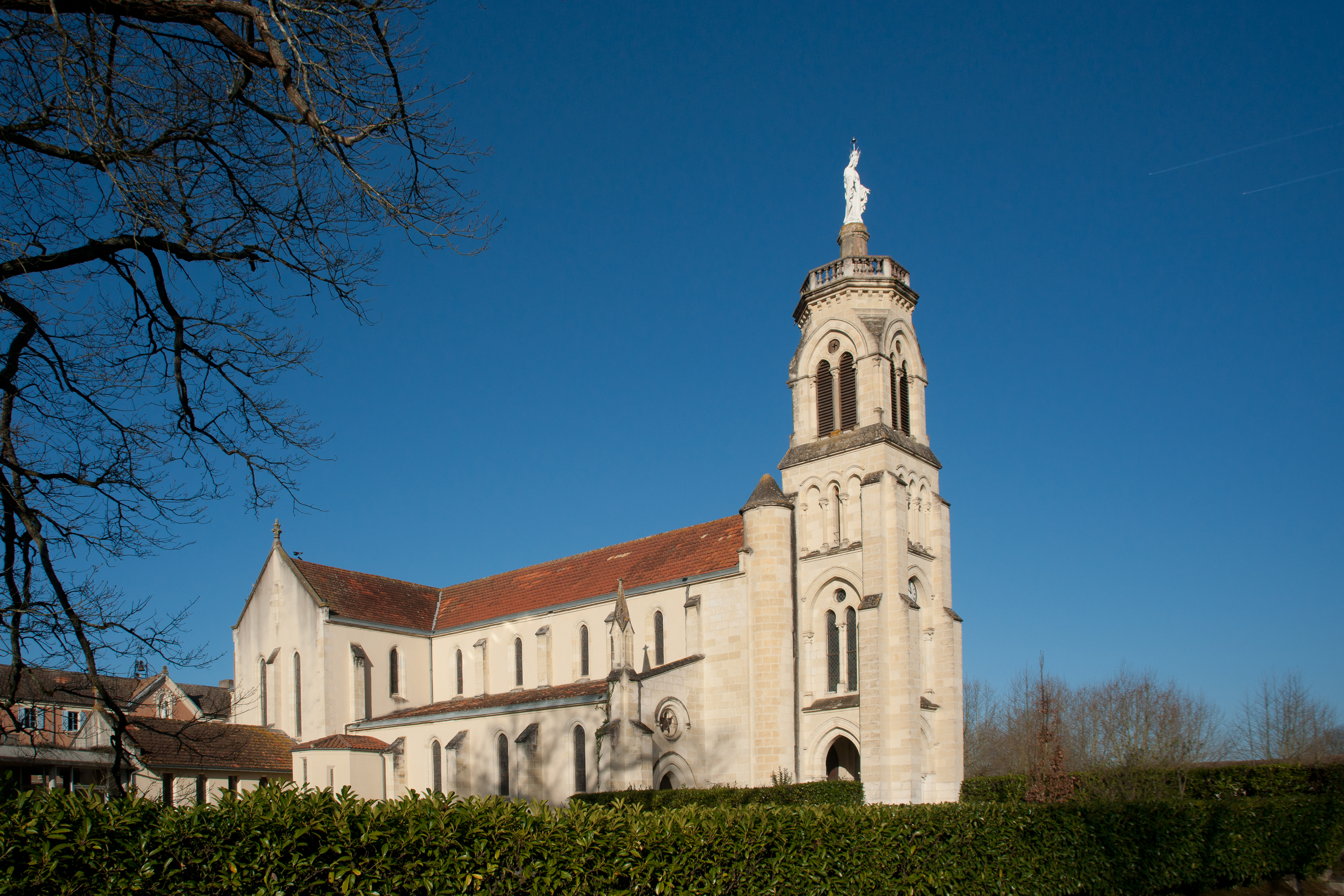 Abbaye Notre-Dame de Maylis